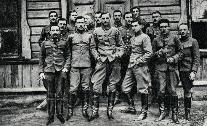 Grupa oficerów VI. batalionu I Brygady Legionów Polskich z Leopoldem Lis-Kulą.